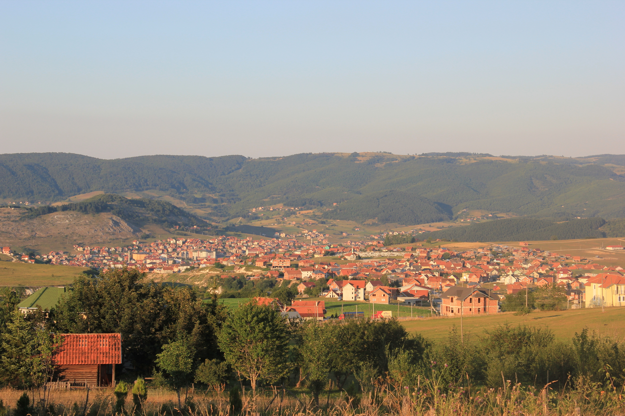 Ansicht von Tutin, Serbien.Hornjoserbsce: Pohlad Tutina.